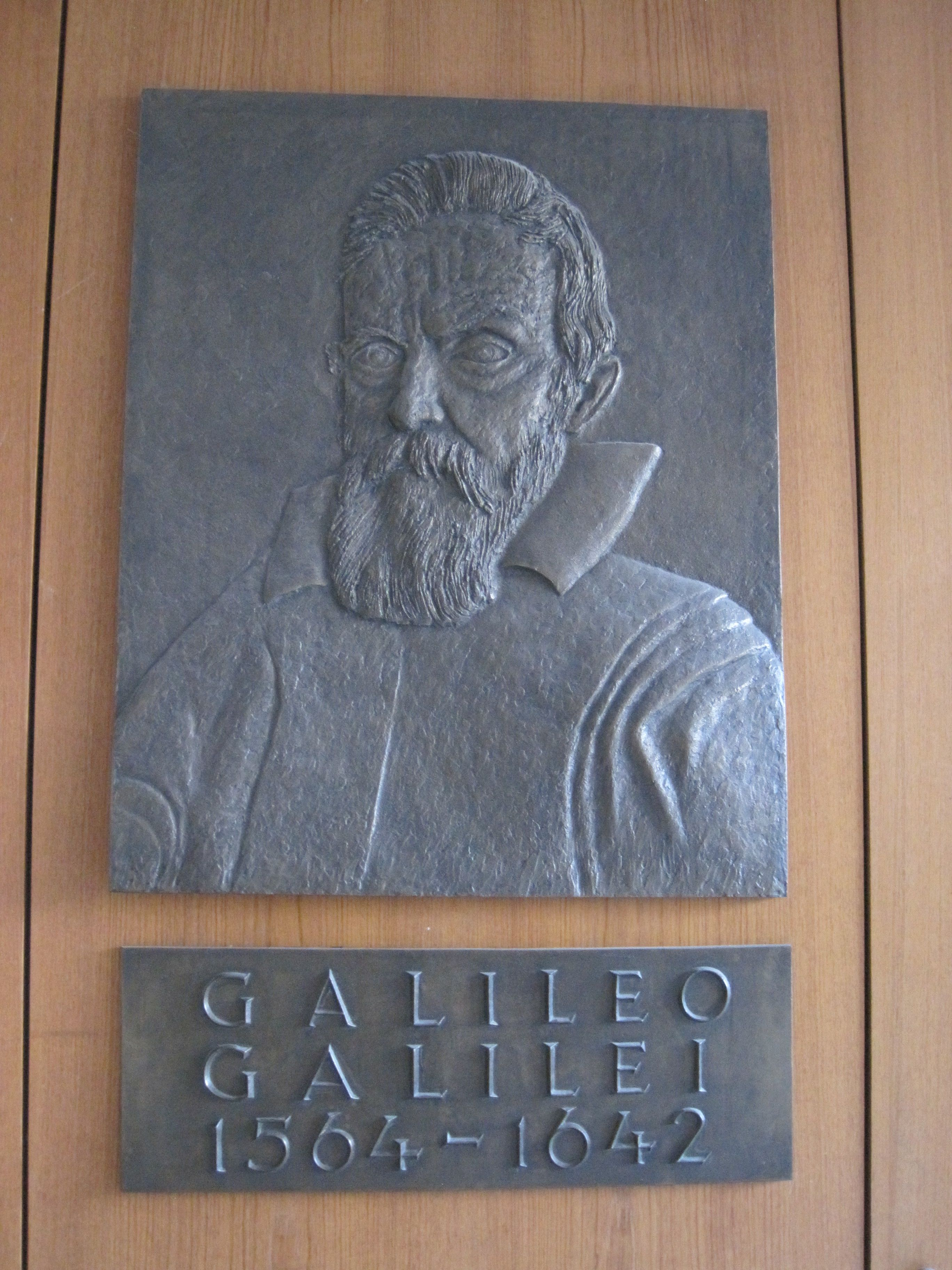 Das Foto zeigt ein Bild von Galileo Galilei im Galilei-Gymnasium in Hamm.